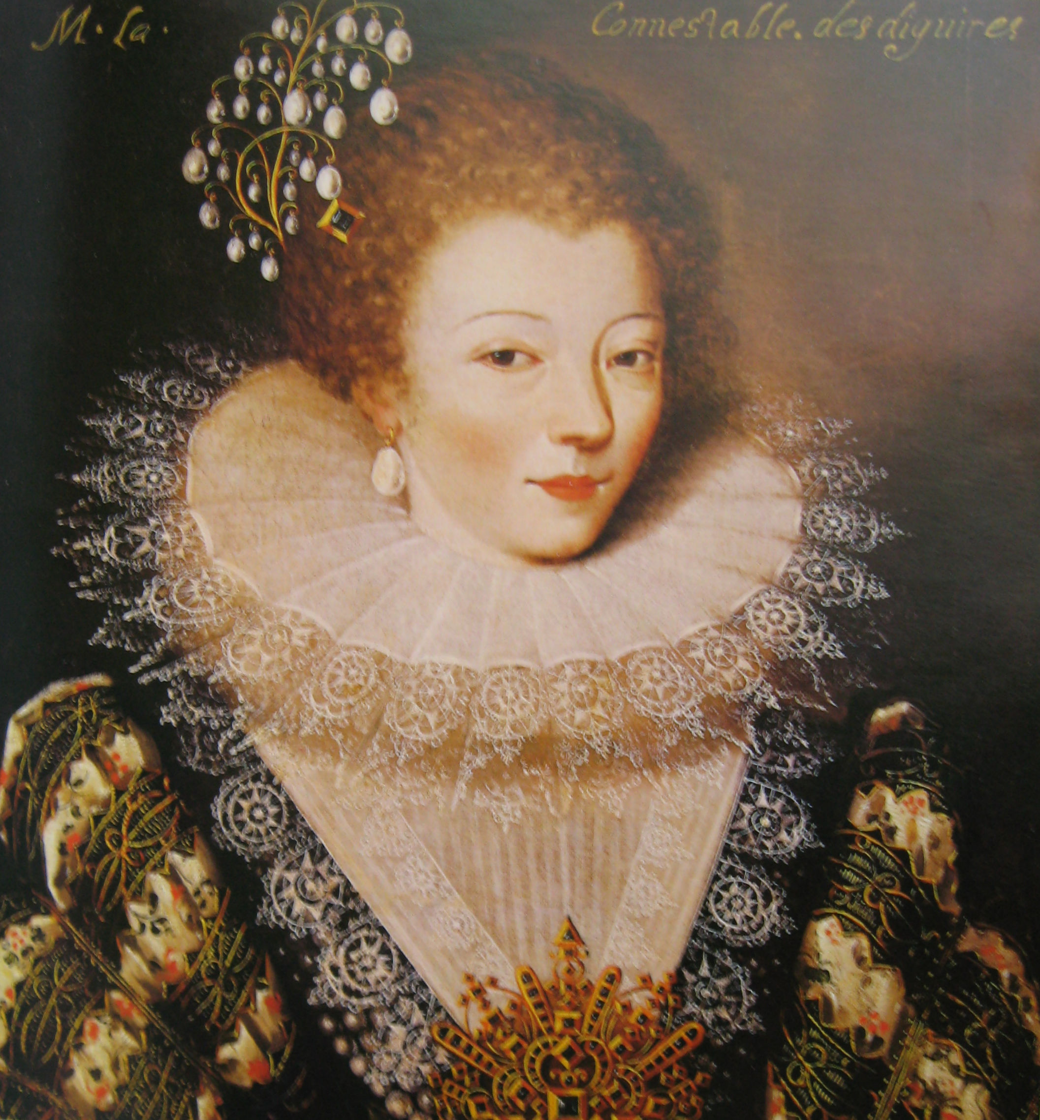 Seconde épouse de François de Bonne, duc de Lesdiguières (1543-1626), en costume d'apparat. Elle l'épouse en 1617, il est nommé grand connétable en 1622, le tableau ne peut-être antérieur à cette date, ou l'inscription est postérieure.